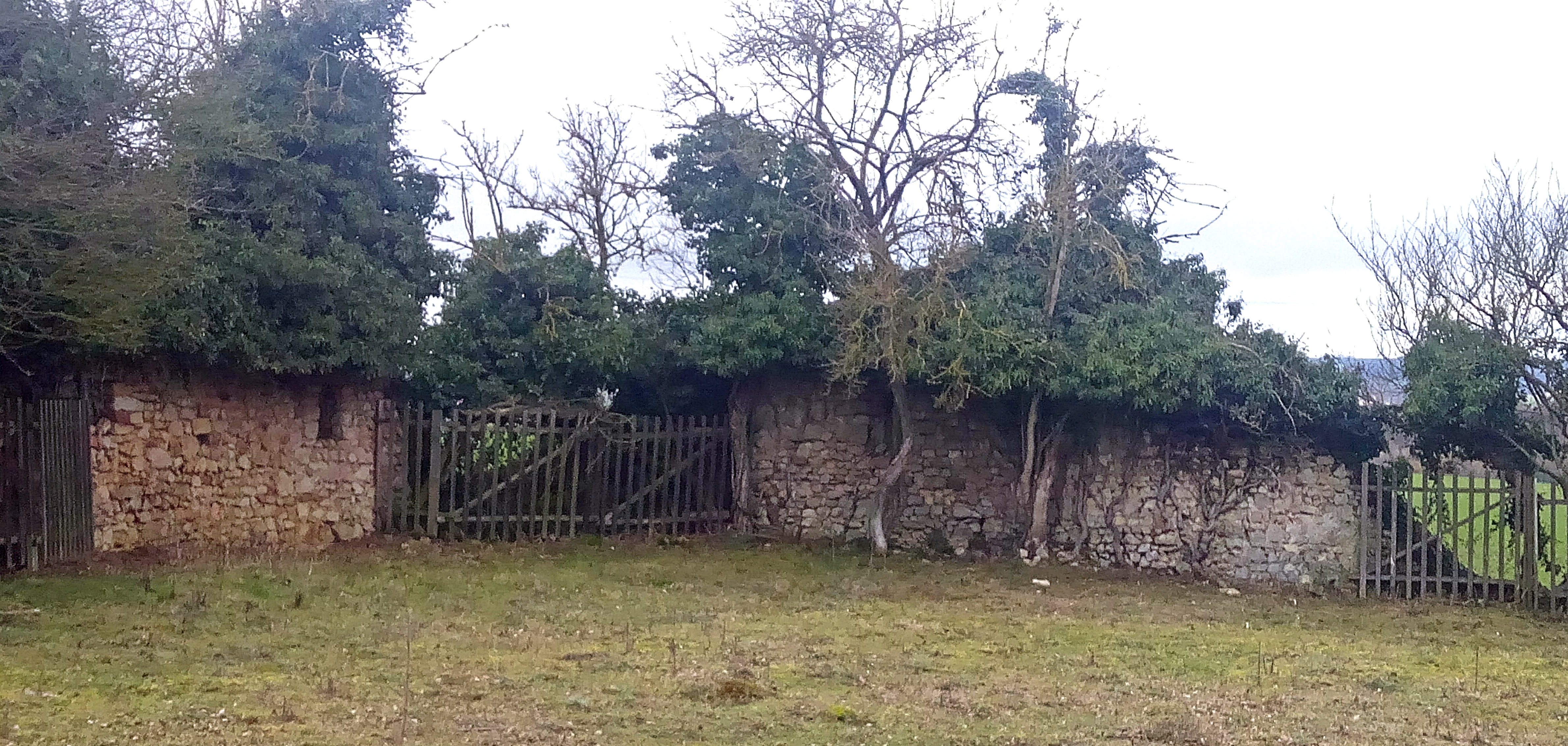 Burgmauer Biedesheim